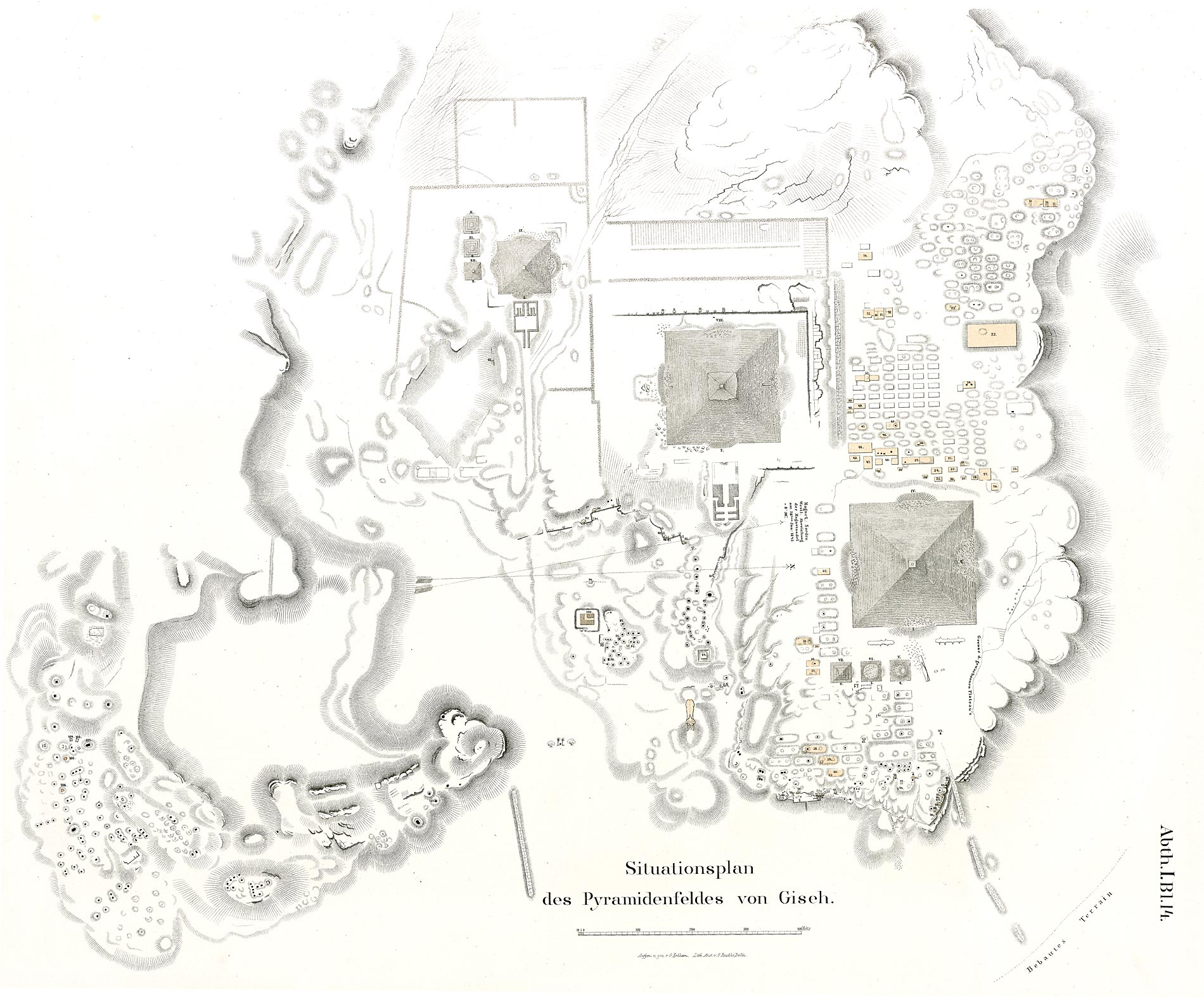 Denkmaeler aus Aegypten und Aethiopien nach den Zeichnungen der von Seiner Majestät dem Koenige von Preussen, Friedrich Wilhelm IV., nach diesen Ländern gesendeten, und in den Jahren 1842–1845 ausgeführten wissenschaftlichen Expedition auf Befehl Seiner Majestät